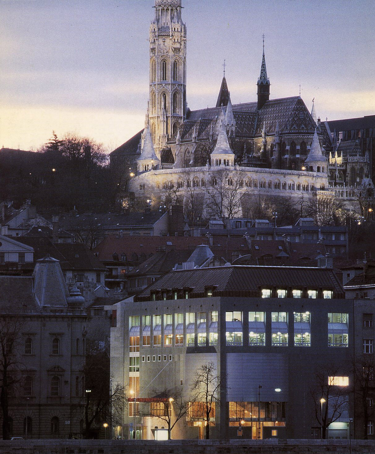 Institut Français de Hongrie à Budapest - 1992 - Georges Maurios